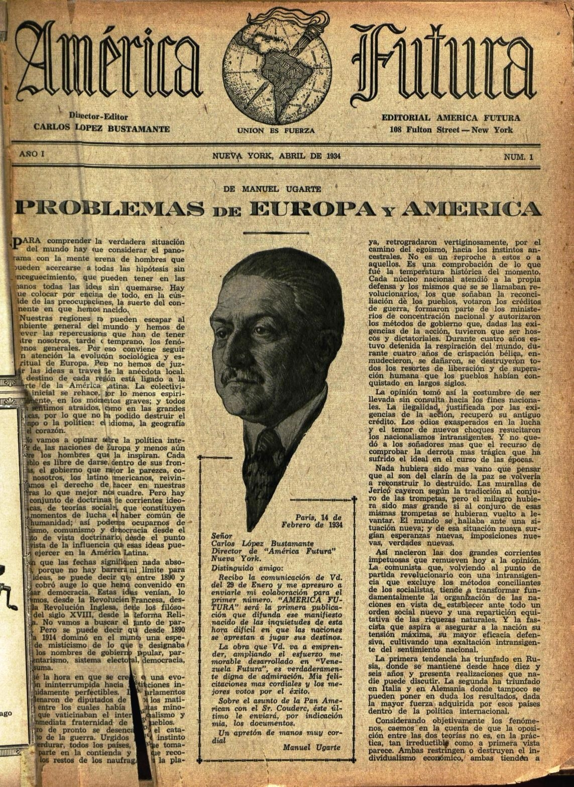 Portada de la revista "América Futura", editada por el periodista Venezolano Carlos López Bustamante en Nueva York, durante los años de su destierro. López Bustamante fue prisionero y exilado del dictador Juan Vicente Gómez.